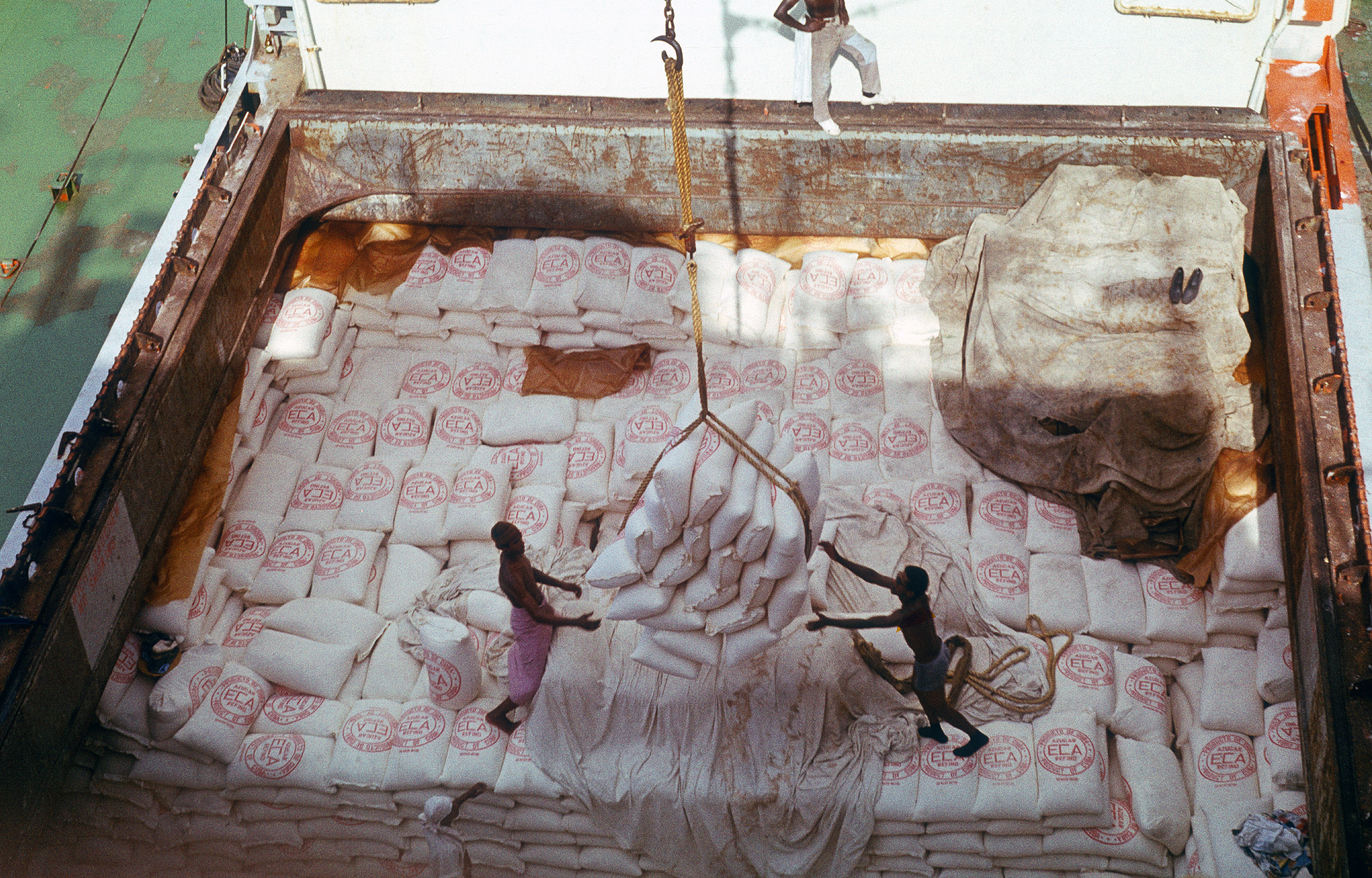 Kuba Juni oder Juli 1973; Bucht von Matanzas; Verladung von Zuckerrohr in Säcken durch Stauer in den Laderaum der MS "Rudolf Breitscheid", danach Abreise nach Rostock (bei der Überfahrt 1 Woche Maschinenschaden - während der Reparaturzeit antriebslos (bei schönem Wetter) auf dem Atlantik getrieben